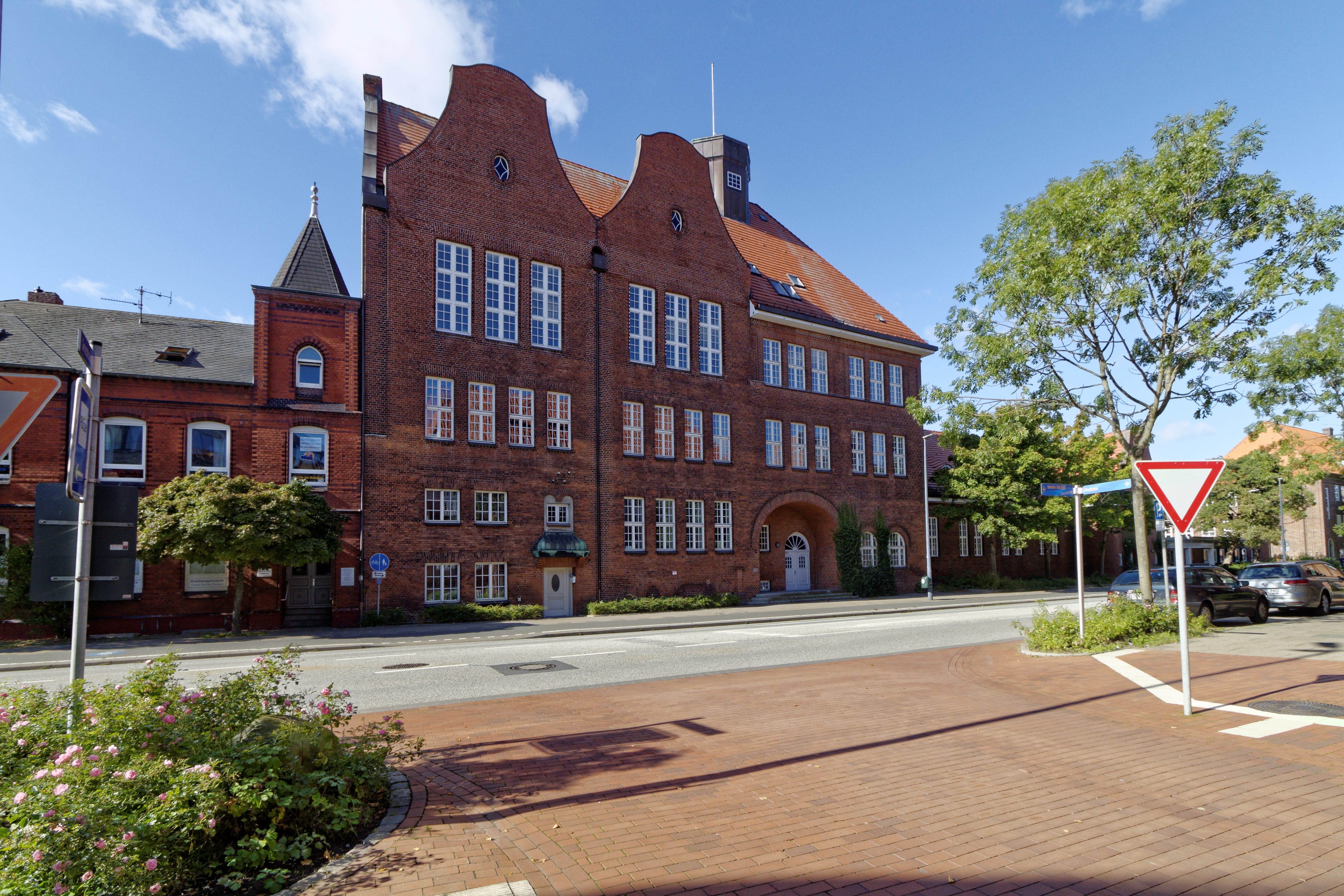 Eckernförde, Reeperbahn 50